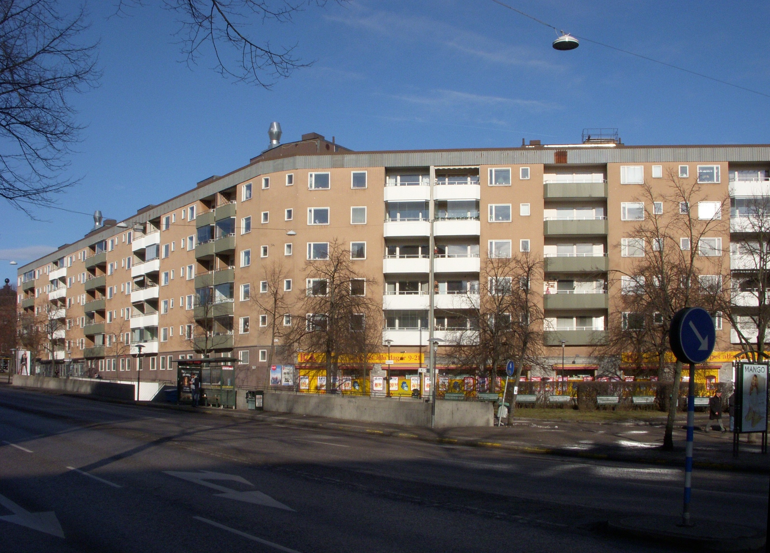 Kvarteret Stativet vid Ringvägen på Södermalm